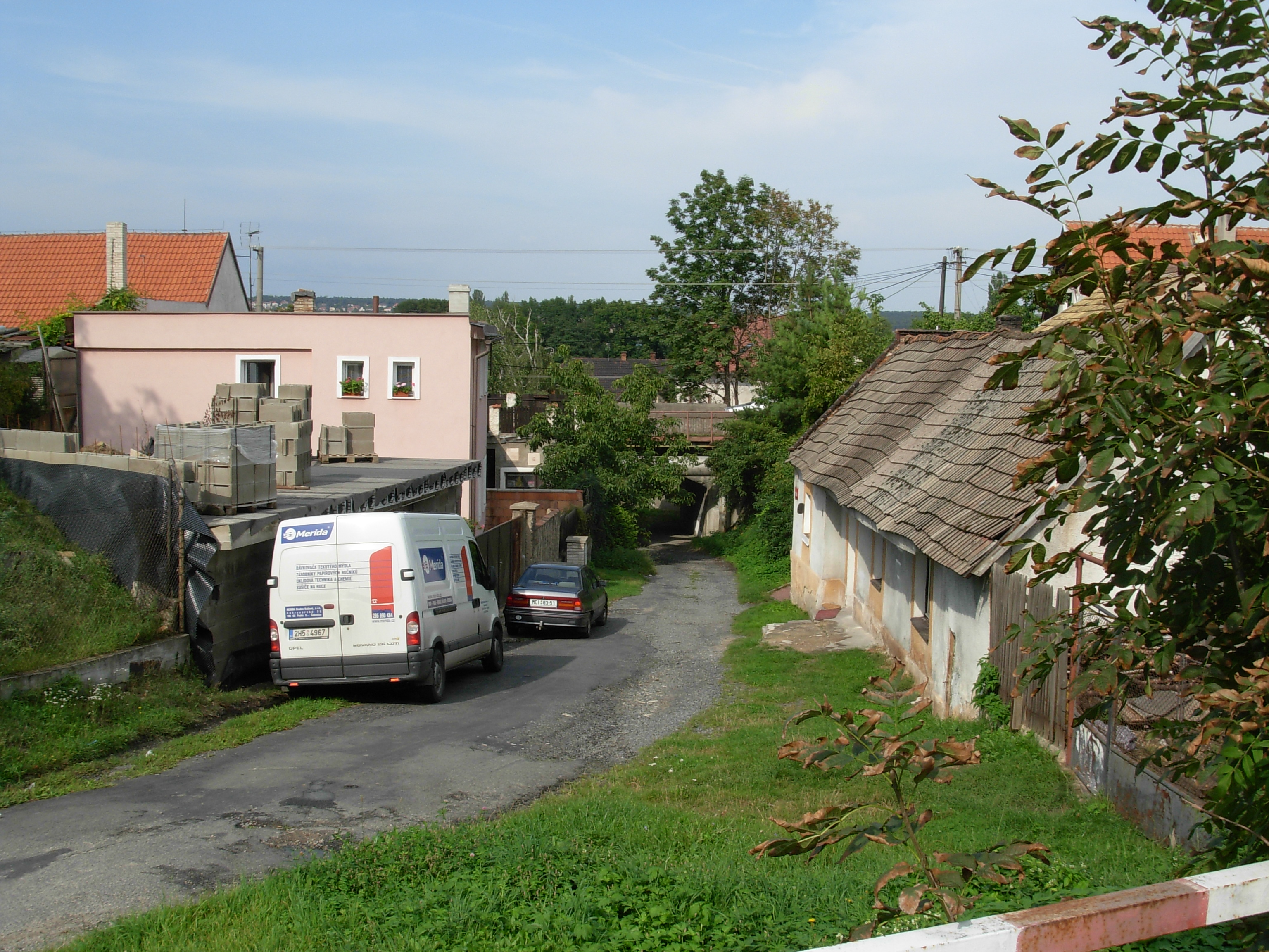 Celkový pohled z ulice Italská na most i s okolními stavbami